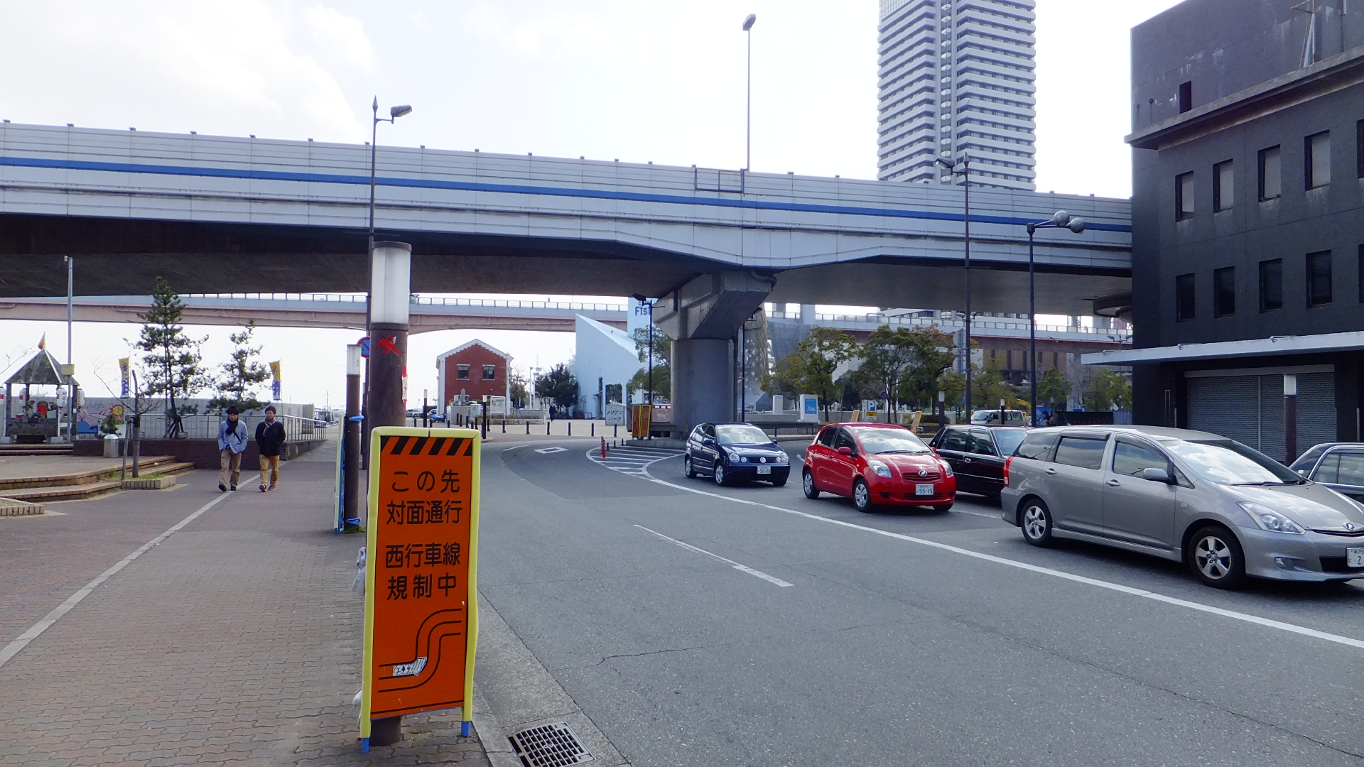 兵庫県神戸市中央区波止場町